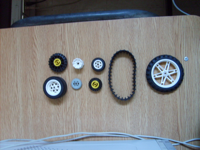 Ruedas que posee Lego Mindstorms para armar el robot